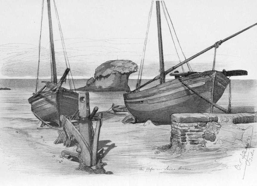 Christian Wilhelm Allers: "La bella Napoli" (1893) - "Am Hafen von Lacco Ameno".